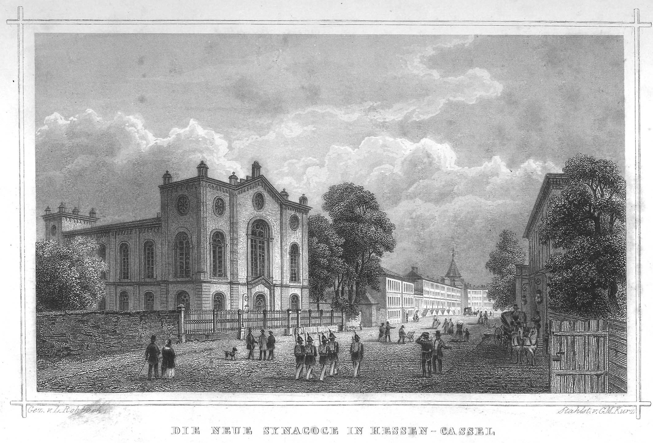 Ansicht der 1839 errichteten Synagoge in Kassel, Stahlstich von Georg Michael Kurz nach einer Zeichnung von Ludwig Rohbock